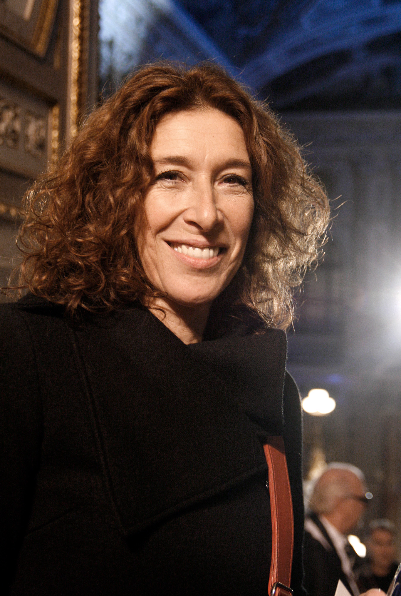 Adele Neuhauser zu Gast bei der Verleihung des Nestroy-Theaterpreises 2010 im Burgtheater in Wien.